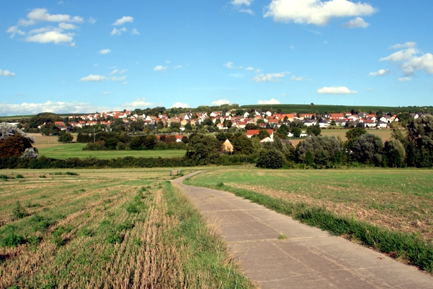 Village Soergenloch in Germany